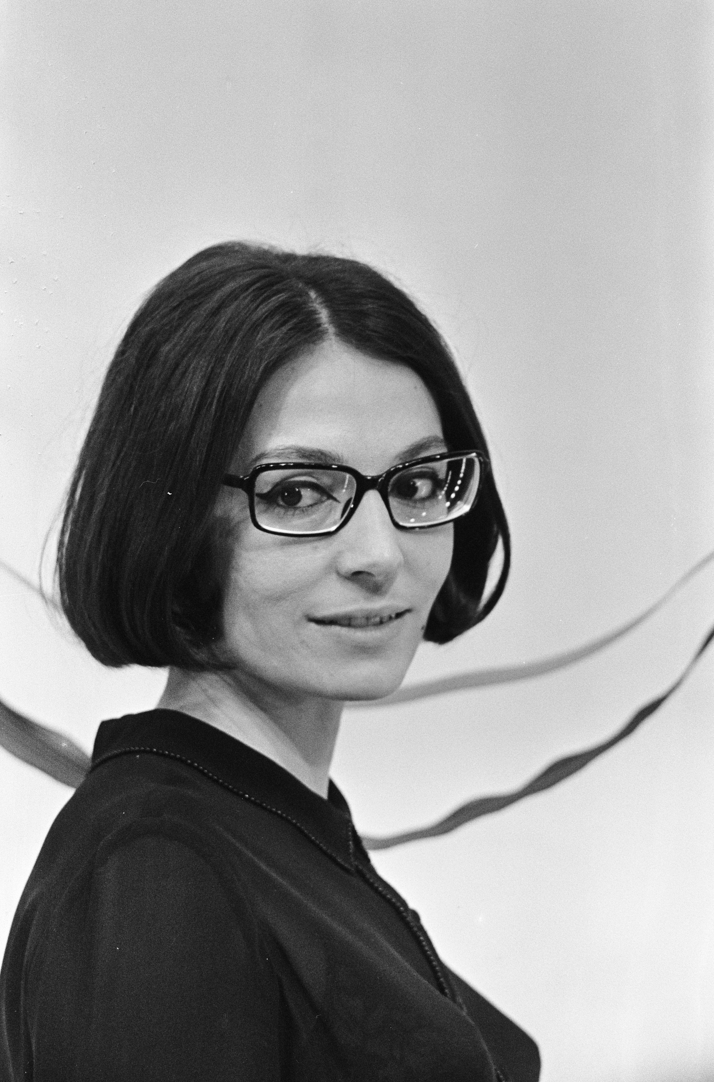 Collectie / Archief : Fotocollectie Anefo Reportage / Serie : [ onbekend ] Beschrijving : Caterina Valente show , Nana Mouskouri (kop) Datum : 3 juni 1966 Persoonsnaam : Mouskouri, Nana Fotograaf : Kroon, Ron / Anefo Auteursrechthebbende : Nationaal Archief Materiaalsoort : Negatief (zwart/wit) Nummer archiefinventaris : bekijk toegang 2.24.01.05 Bestanddeelnummer : 919-2233